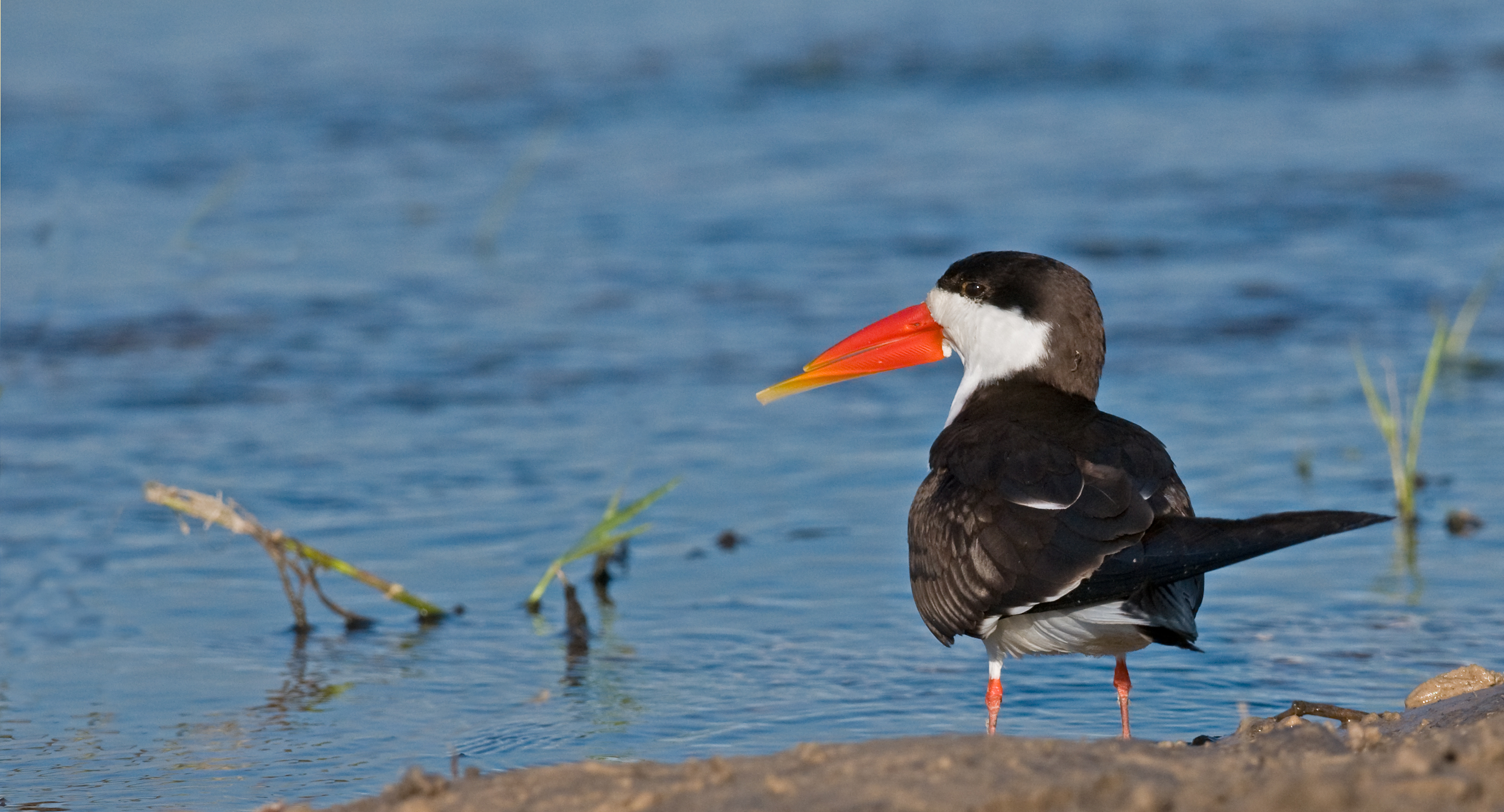 Amazing beak Botswana